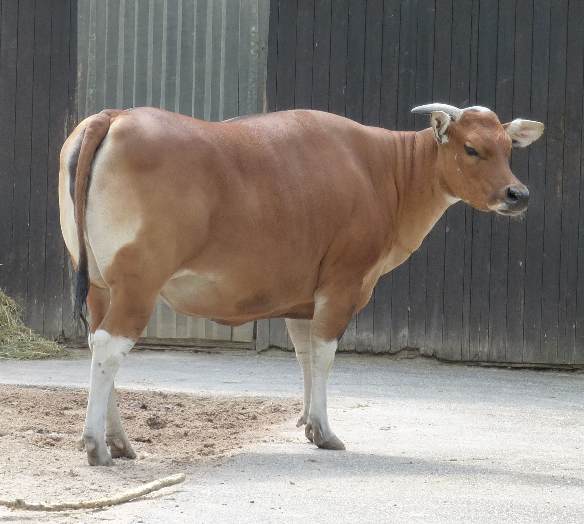 in der Huftieranlage des Karlsruher Zoos